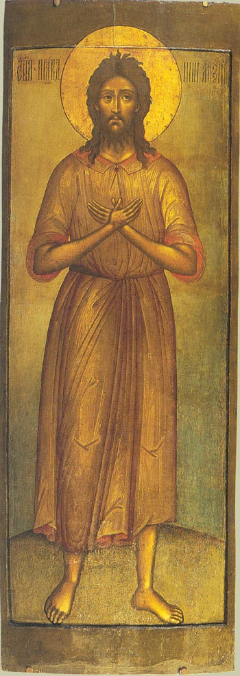 Икона Алексея Человека Божьего письма Симона Ушакова (?) из собрания ГИМ. Находилась в часовне под Успенской церковью Николо-Угрешского монастыря.